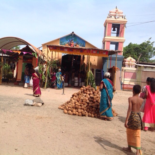 வேலம்பிராய் கண்ணகைஅம்மன் ஆலயம்